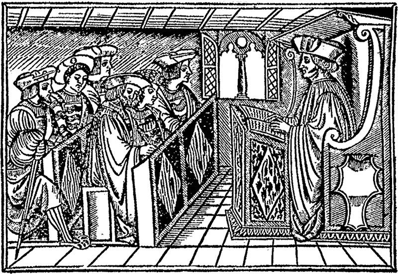 Signorolo Omodei in cattedra